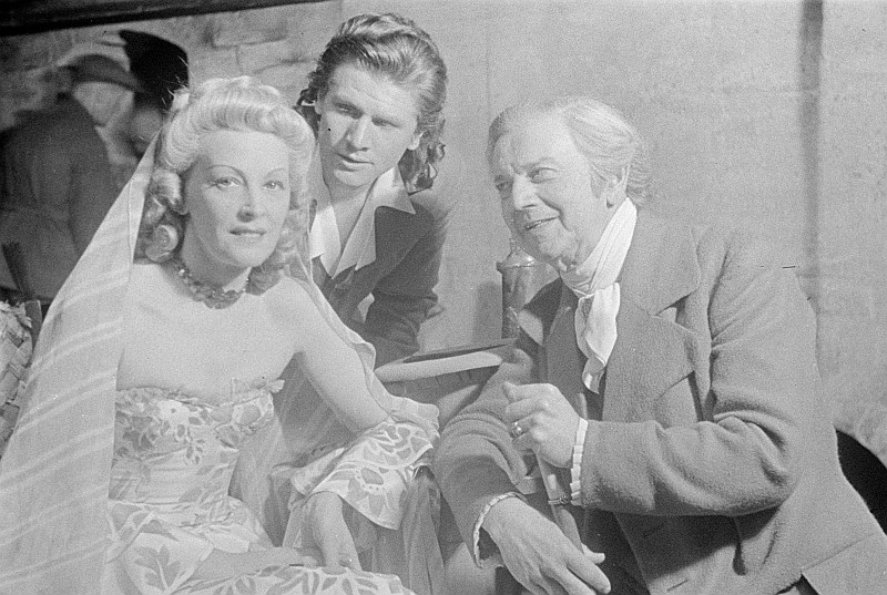 Original image description from the Deutsche Fotothek Szenenbilder